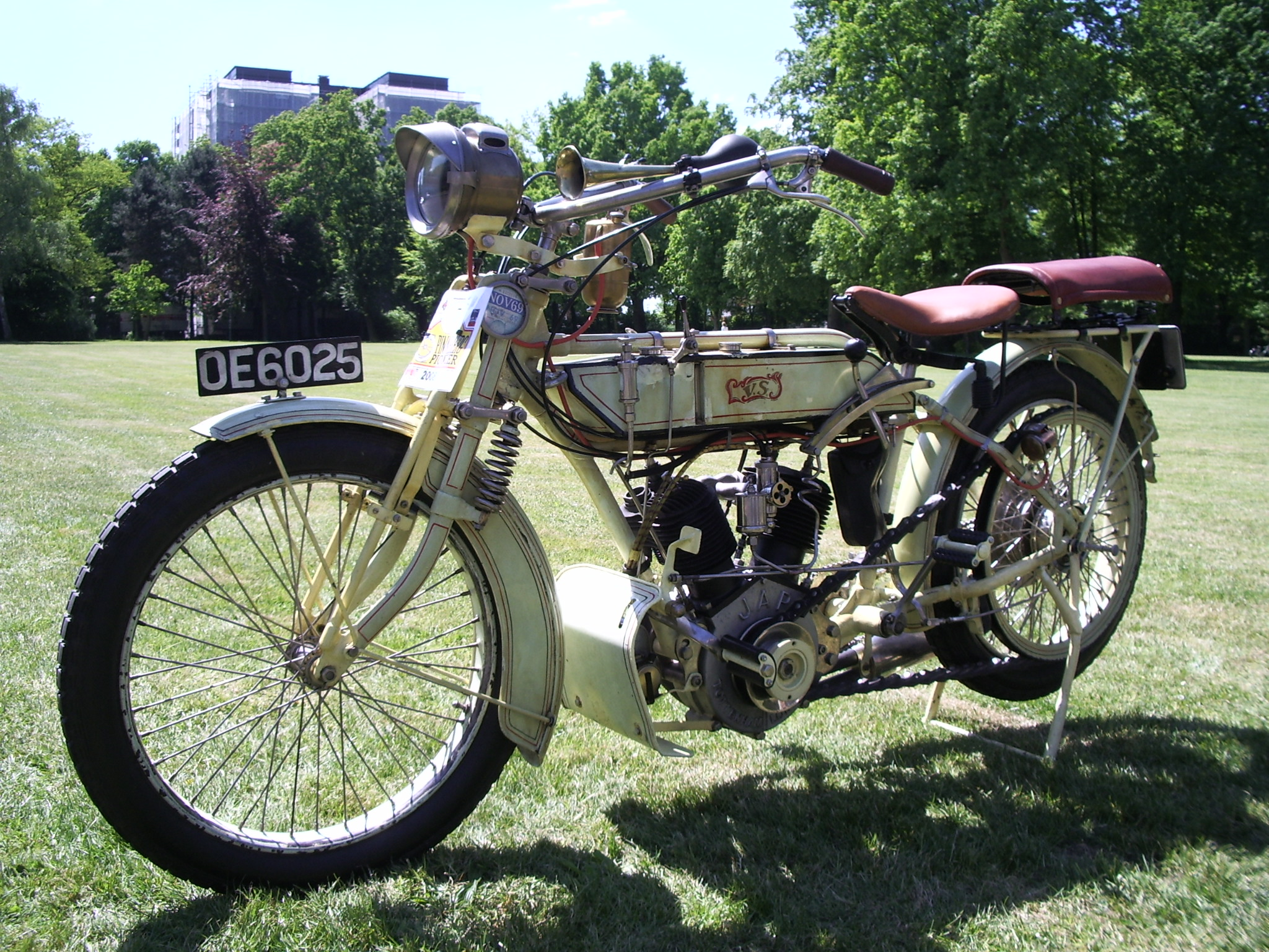 Vindec-Special Motorrad von 1912